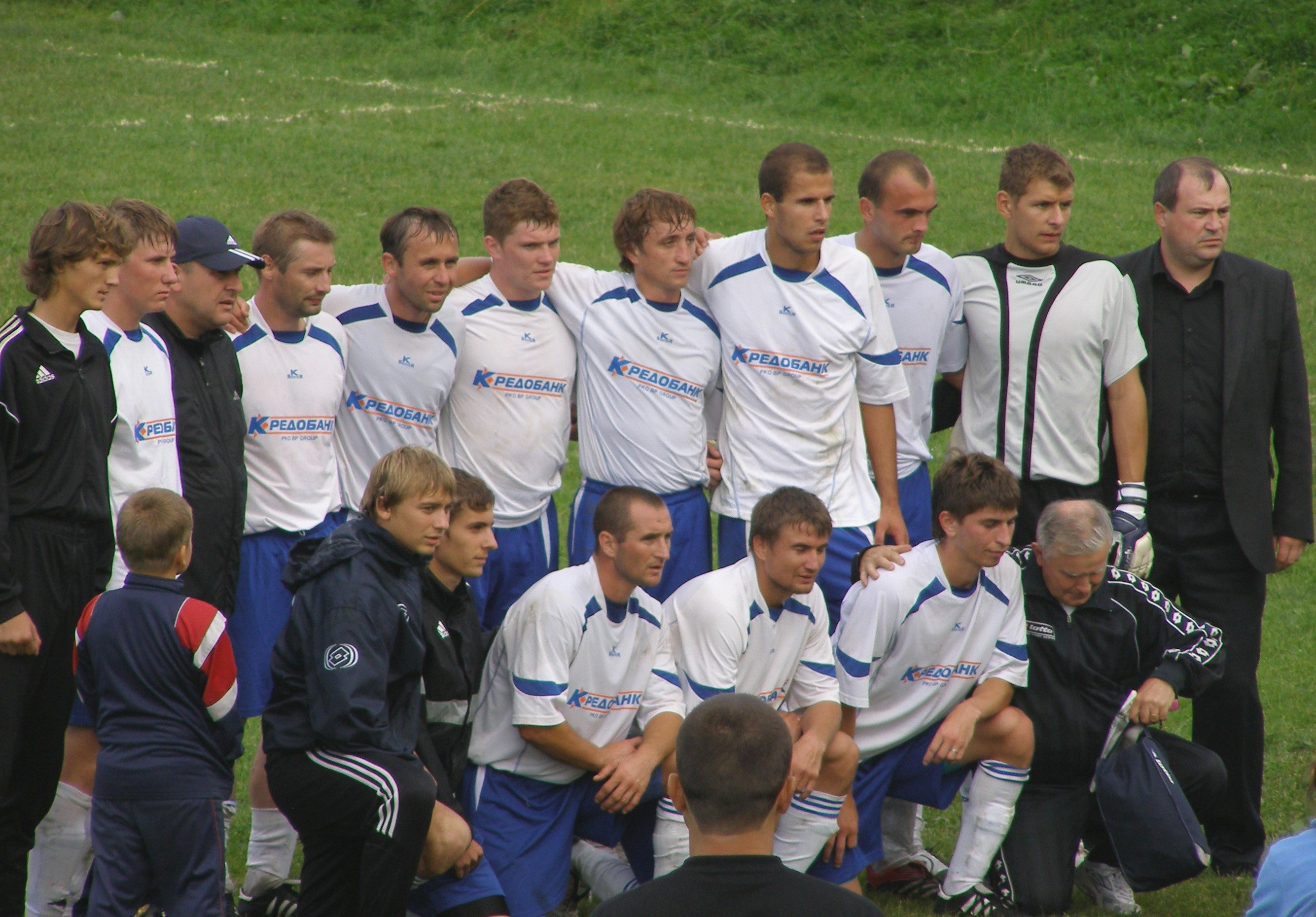 FC Naftusia (Skhidnytsia)